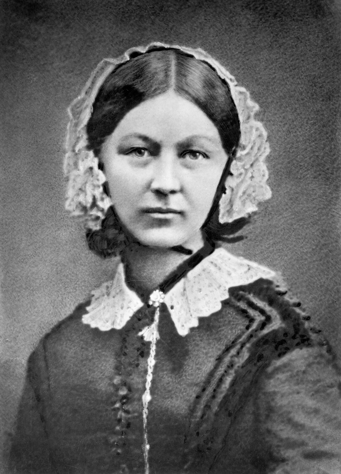 Photograph by Henry Hering